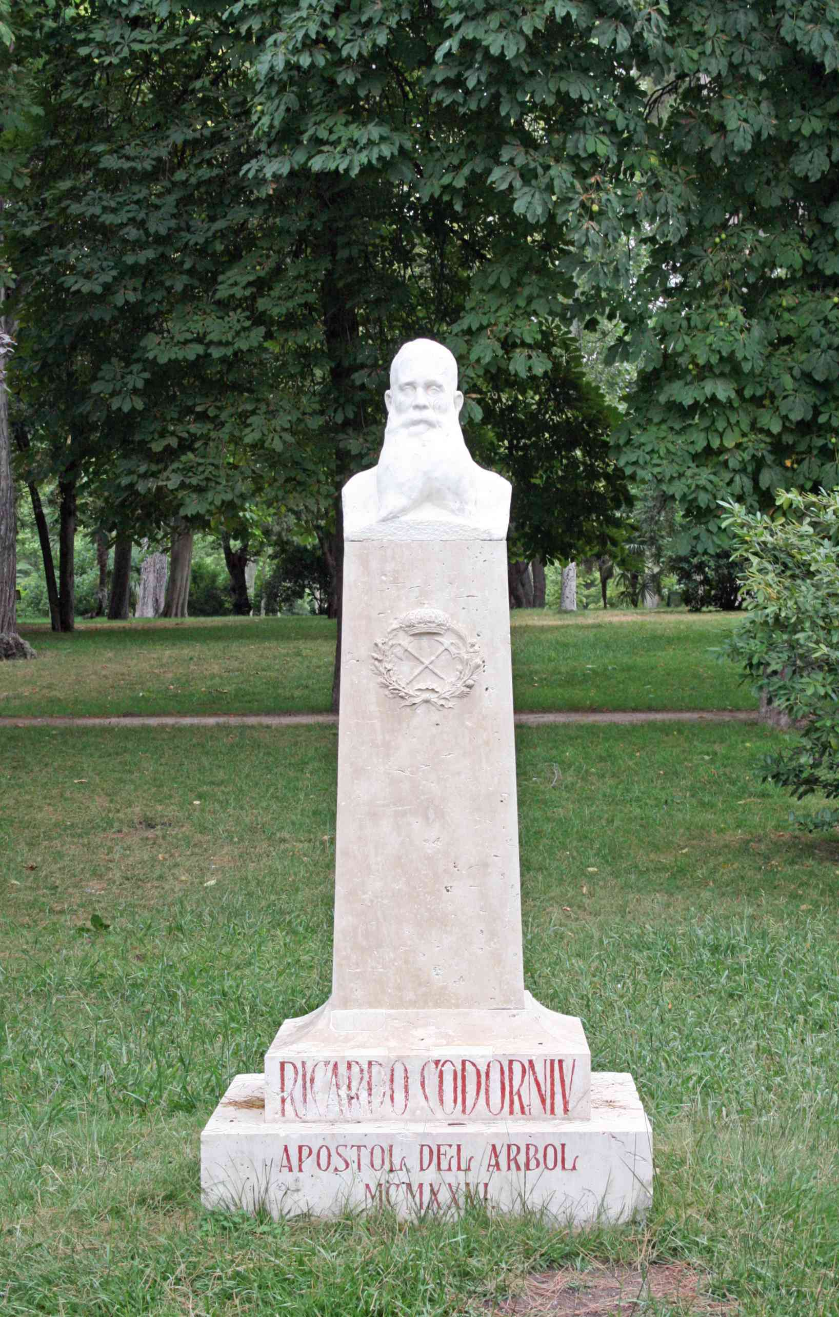 Monumento a Ricardo Codorniu, apóstol del árbol, en el Parque del Retiro de Madrid (España).